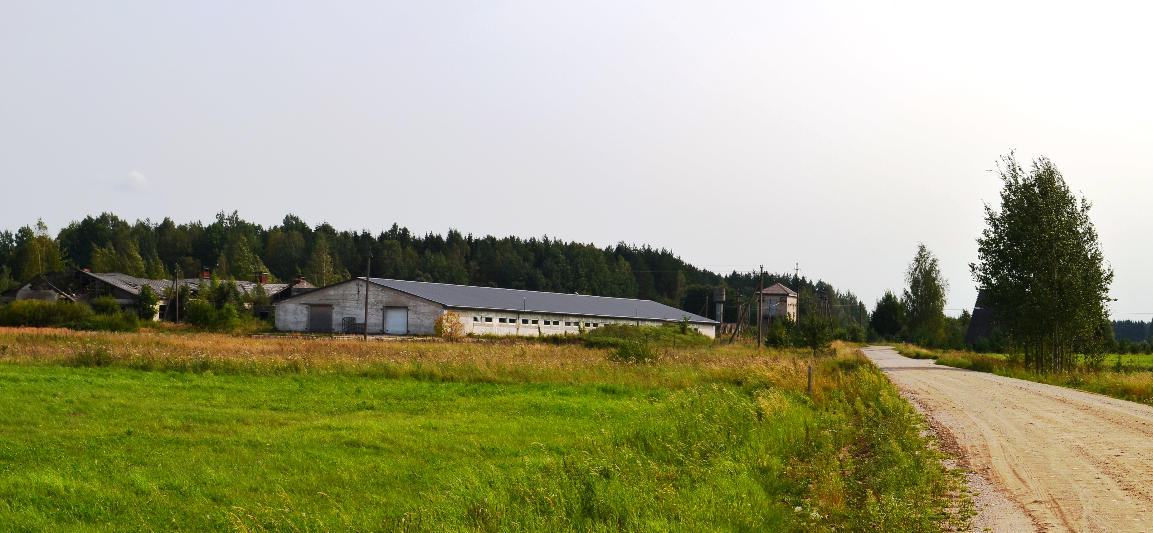 Linkos, Mickūnų sen., Vilniaus raj.